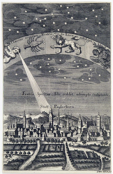 „Statt Paderborn“ Kupferstich von G. Pfautz. 31 x 20 cm